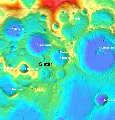 斯莱特陨石坑照片